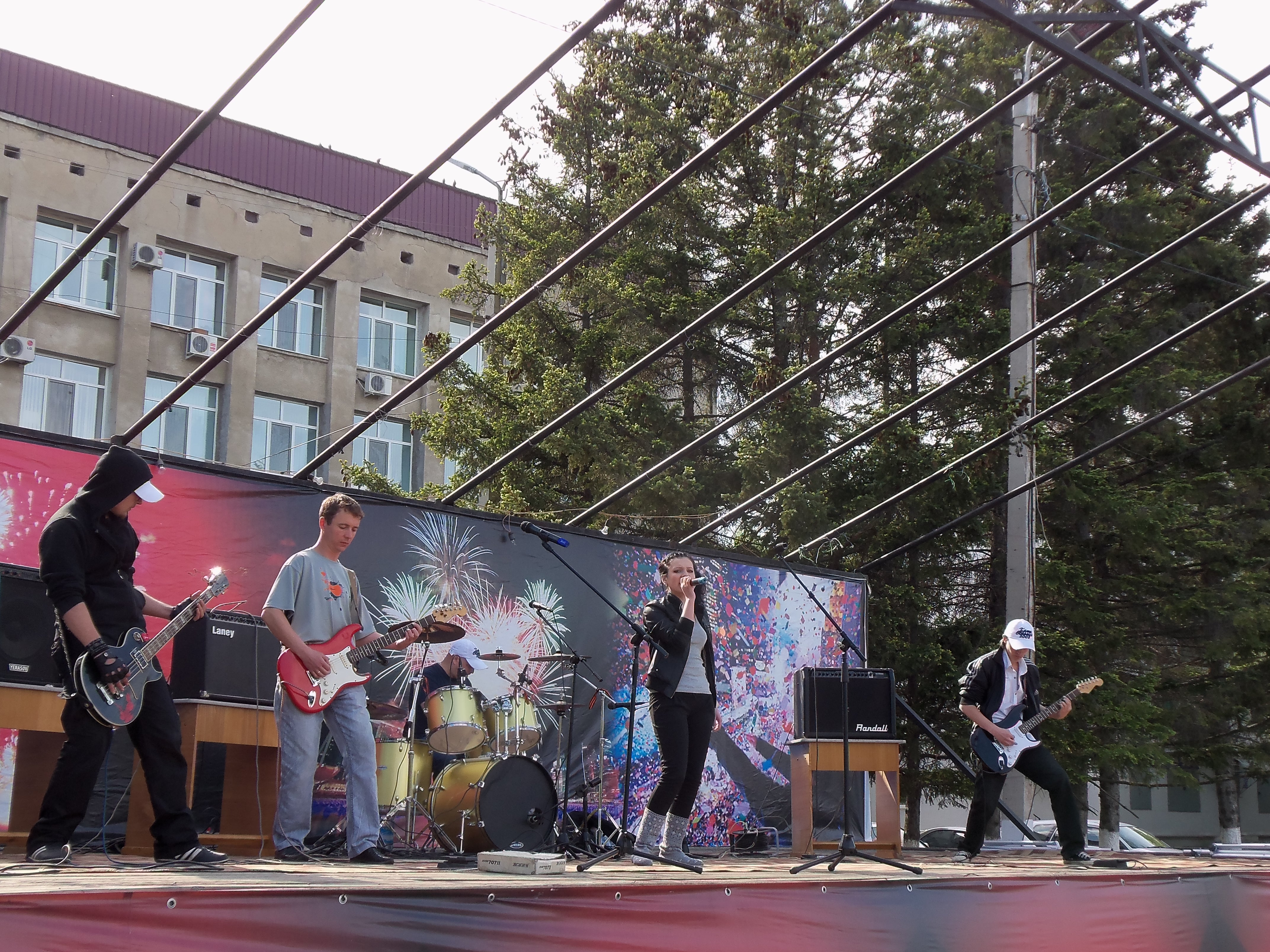 на сцене